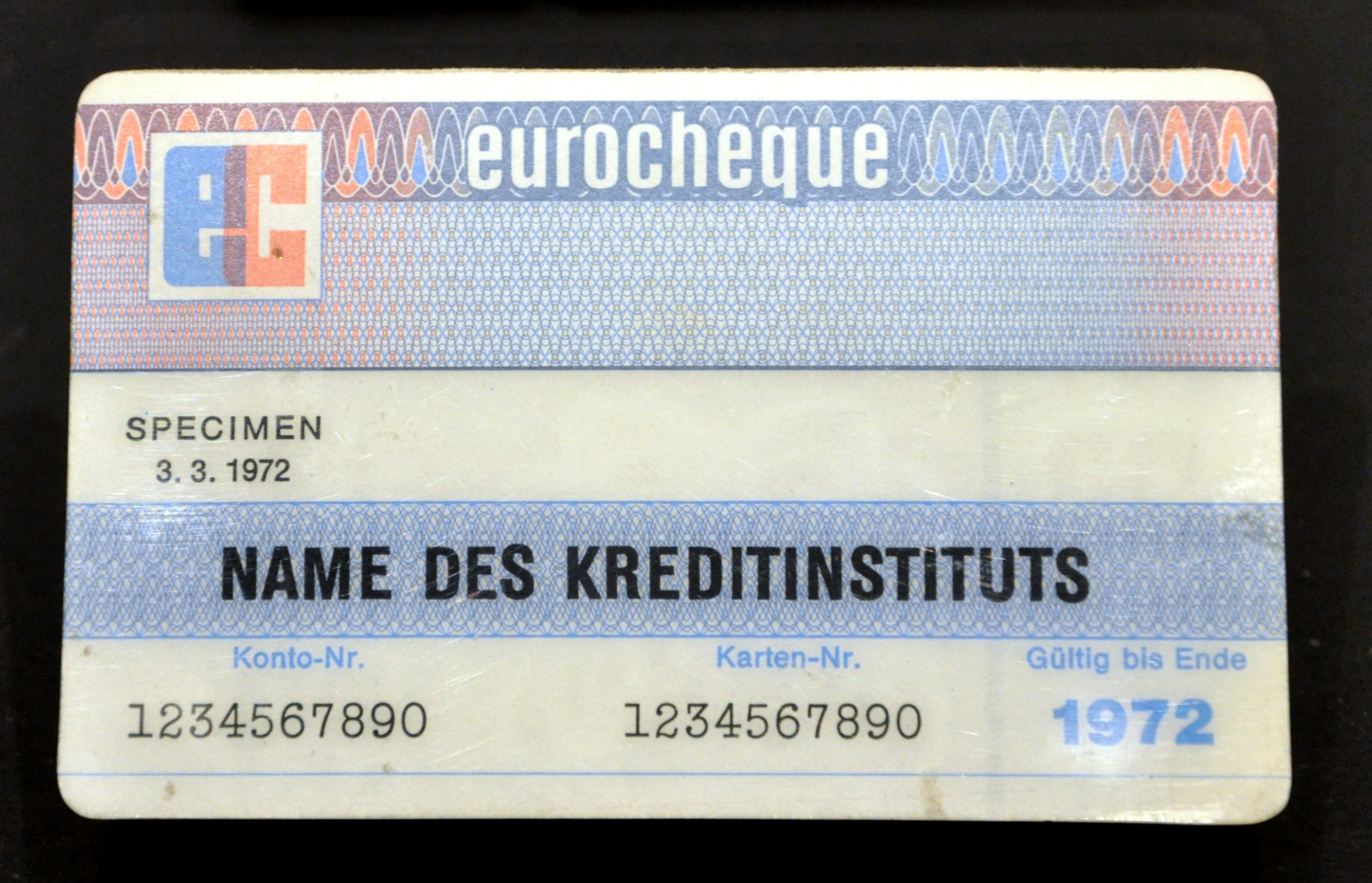 Eurocheque-Karte von 1972, Muster, Wirtschaftsmuseum Ravensburg Wirtschaftsmuseum LocationRavensburg, GermanyCoordinates47° 46′ 49″ N, 9° 36′ 55″ E Established28 October 2012Web page control : Q2585923